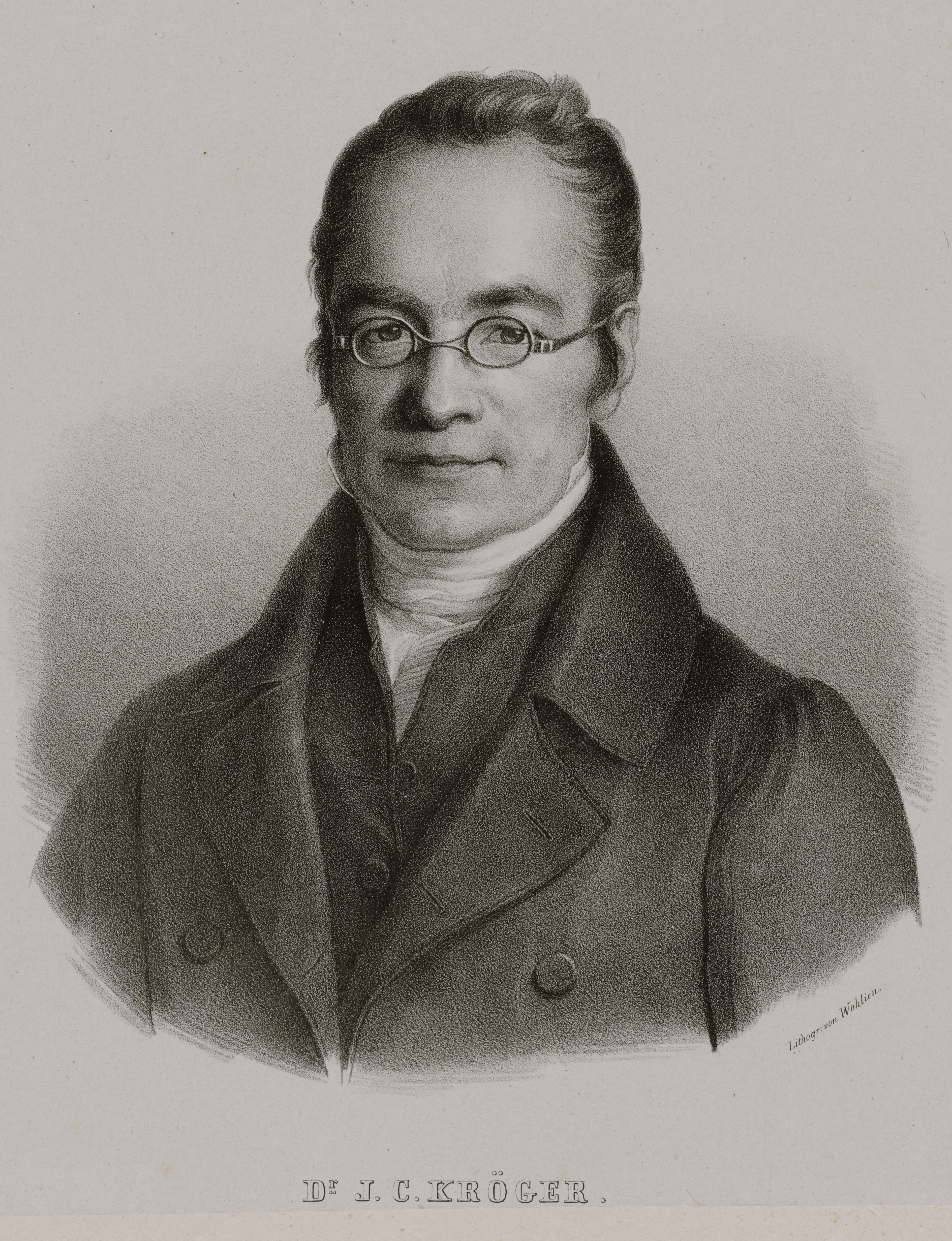 Dr. J. C. Kröger